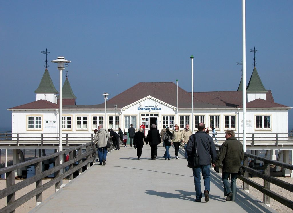 Usedom: Seebrücke von Ahlbeck, Heringsdorf